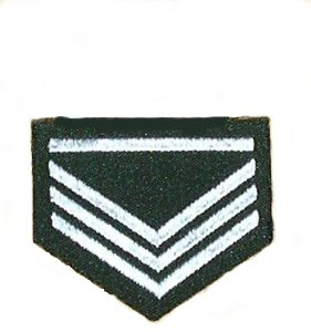 Vingsersjant: Distinksjonen for oversersjant i Luftforsvaret.